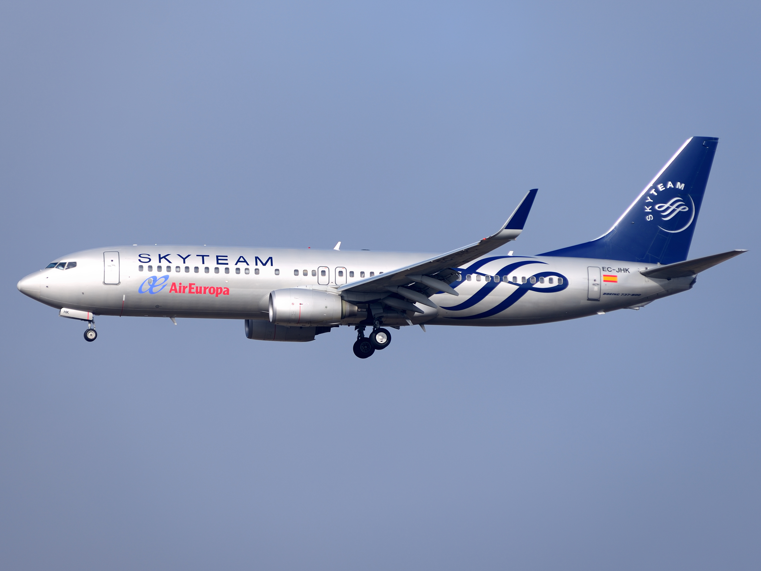 Air Europa Sky Team Livery B737-800 EC-JHK